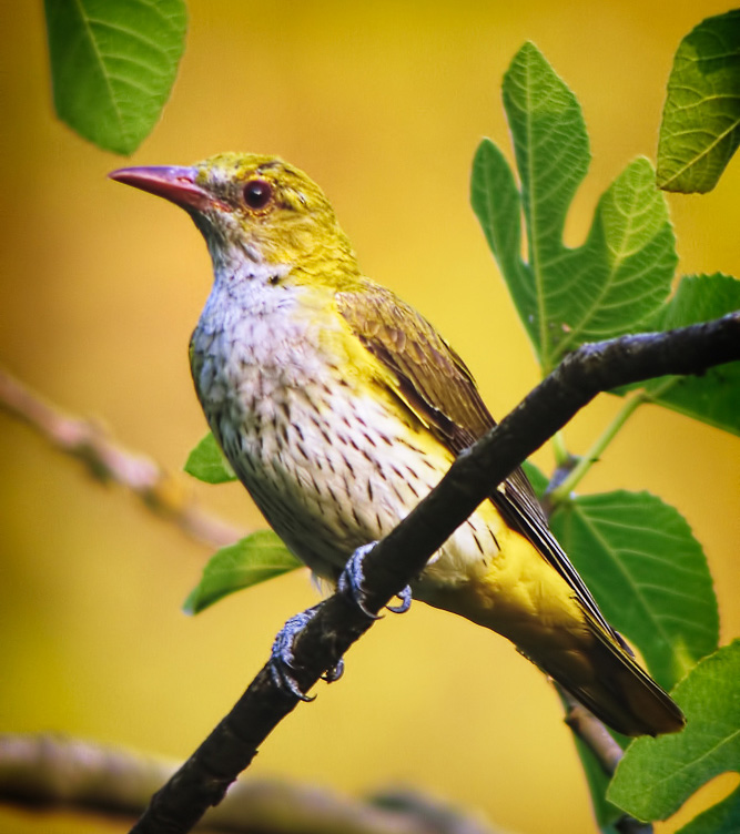 Oropéndola Oriolus oriolus hembra, Ayódar, Valencia, Spain